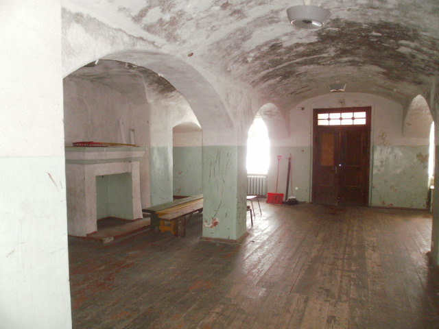 Oletatava linnusetorni I korrus - praegune vestibüül. Tünnvõlvid ja sambad tunduvad olevat mõisaaegne ümberehitus. Vaade praegusele läänepoolsele peasissepääsule.